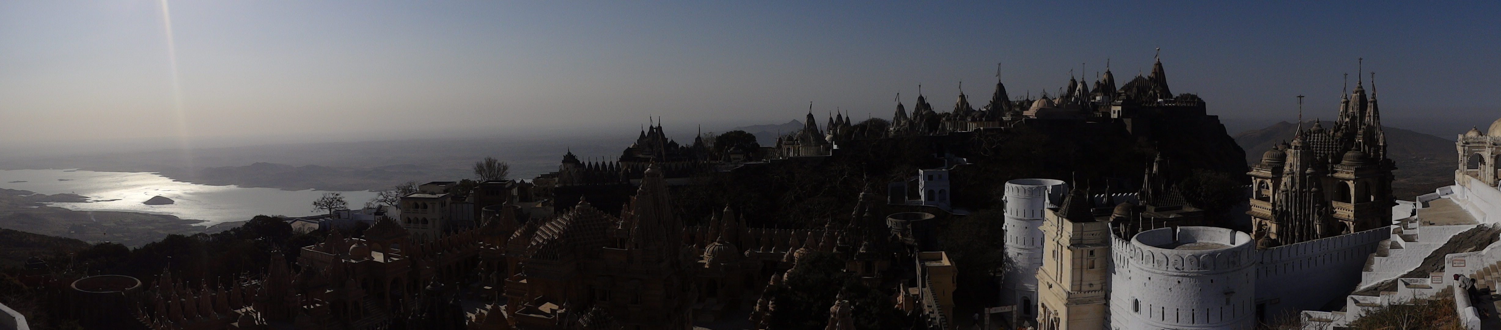 Palitana Panorama